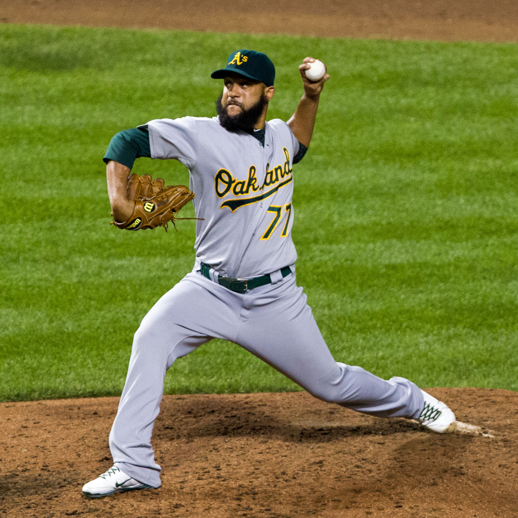 Jordan Norberto